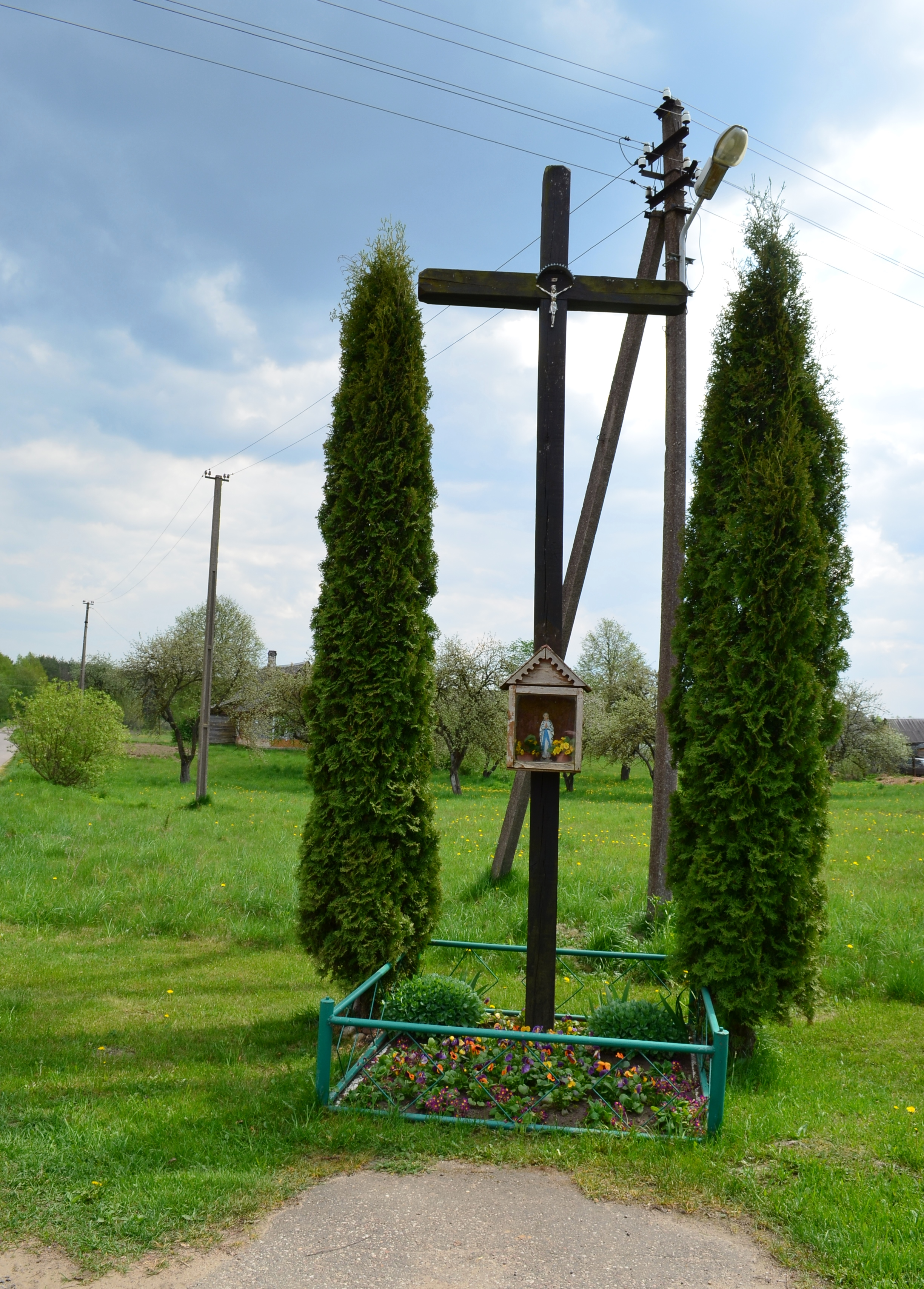 Kryžius, Jadvygiškės, Vilniaus raj.